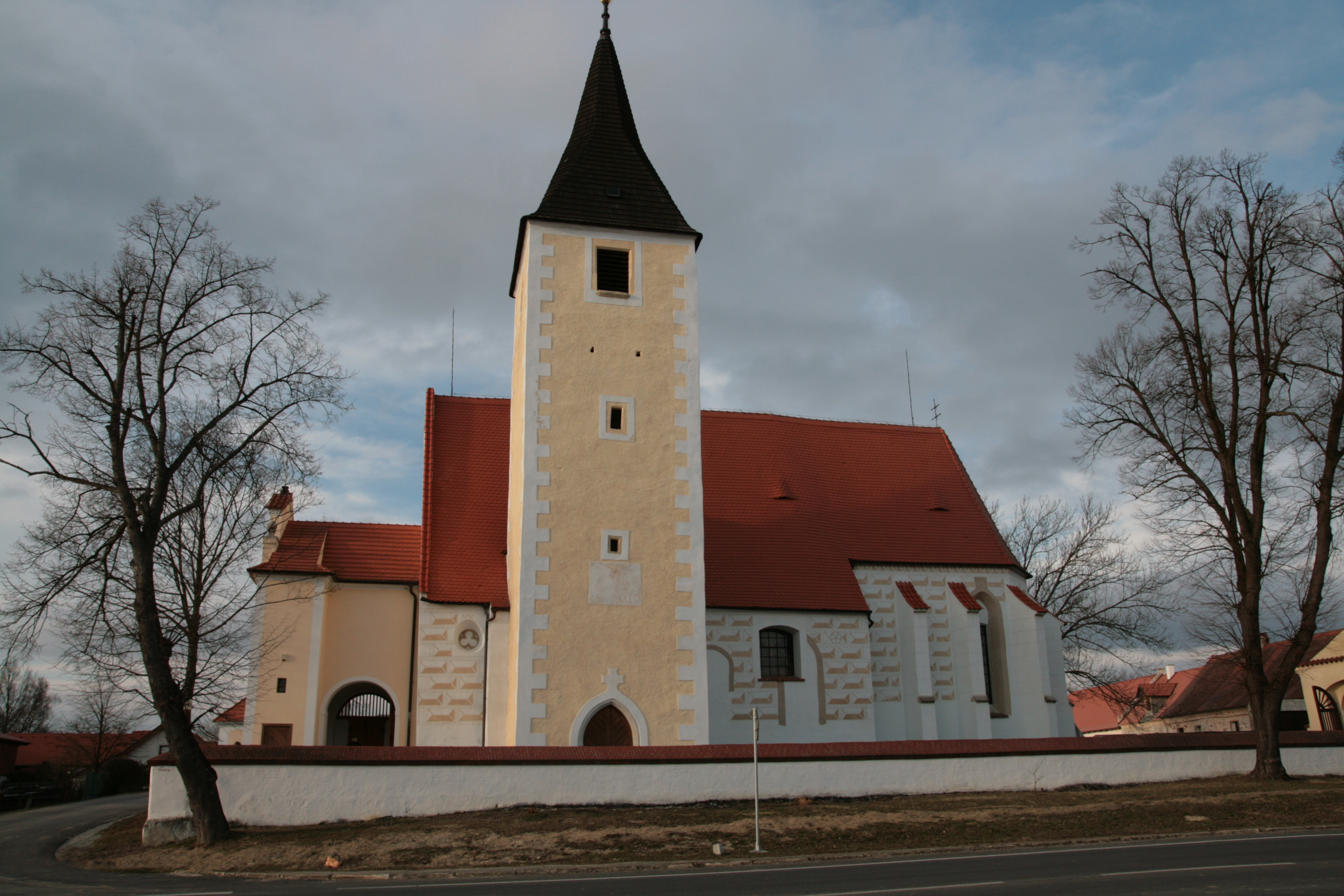 Obec Mladošovice v okrese České Budějovice. Kostel svatého Bartoloměje. Celkový pohled od jihu.